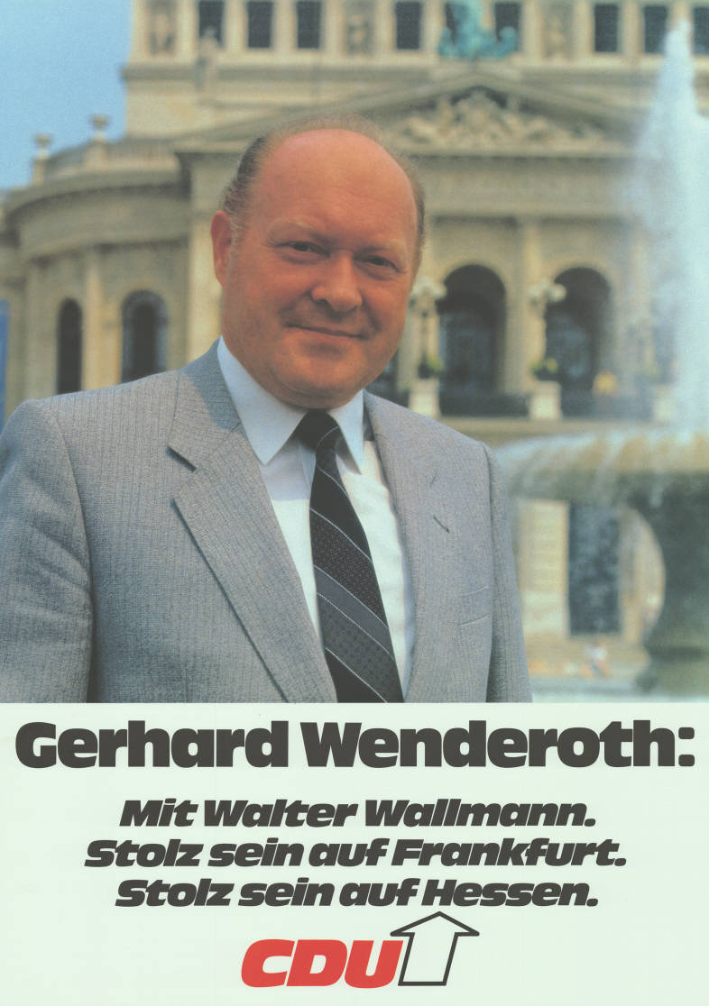 Gerhard Wenderoth: Mit Walter Wallmann. Stolz sein auf Frankfurt. Stolz sein auf Hessen. CDU Abbildung: Foto Plakatart: Kandidaten-/Personenplakat mit Porträt Objekt-Signatur: 10-007 : 609 Bestand: Landtagswahlplakate Hessen (10-007) GliederungBestand10-18: Landtagswahlplakate Hessen (10-007) » CDU Lizenz: KAS/ACDP 10-007 : 609 CC-BY-SA 3.0 DE